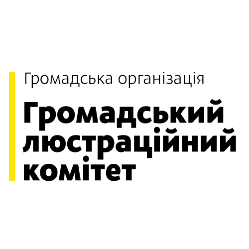 Логотип громадської організації «Громадський люстраційний комітет»